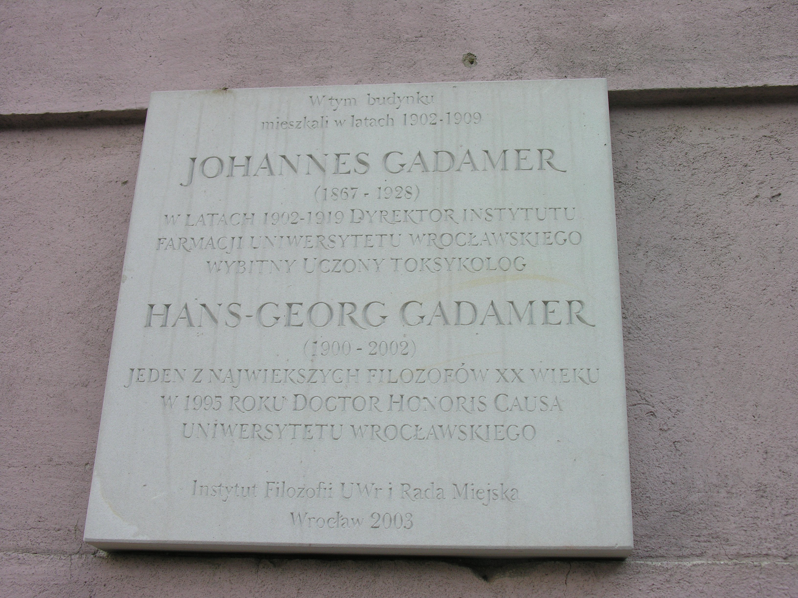 Tablica ku czci Gadamerów na ul. Szewskiej 28 we Wrocławiu